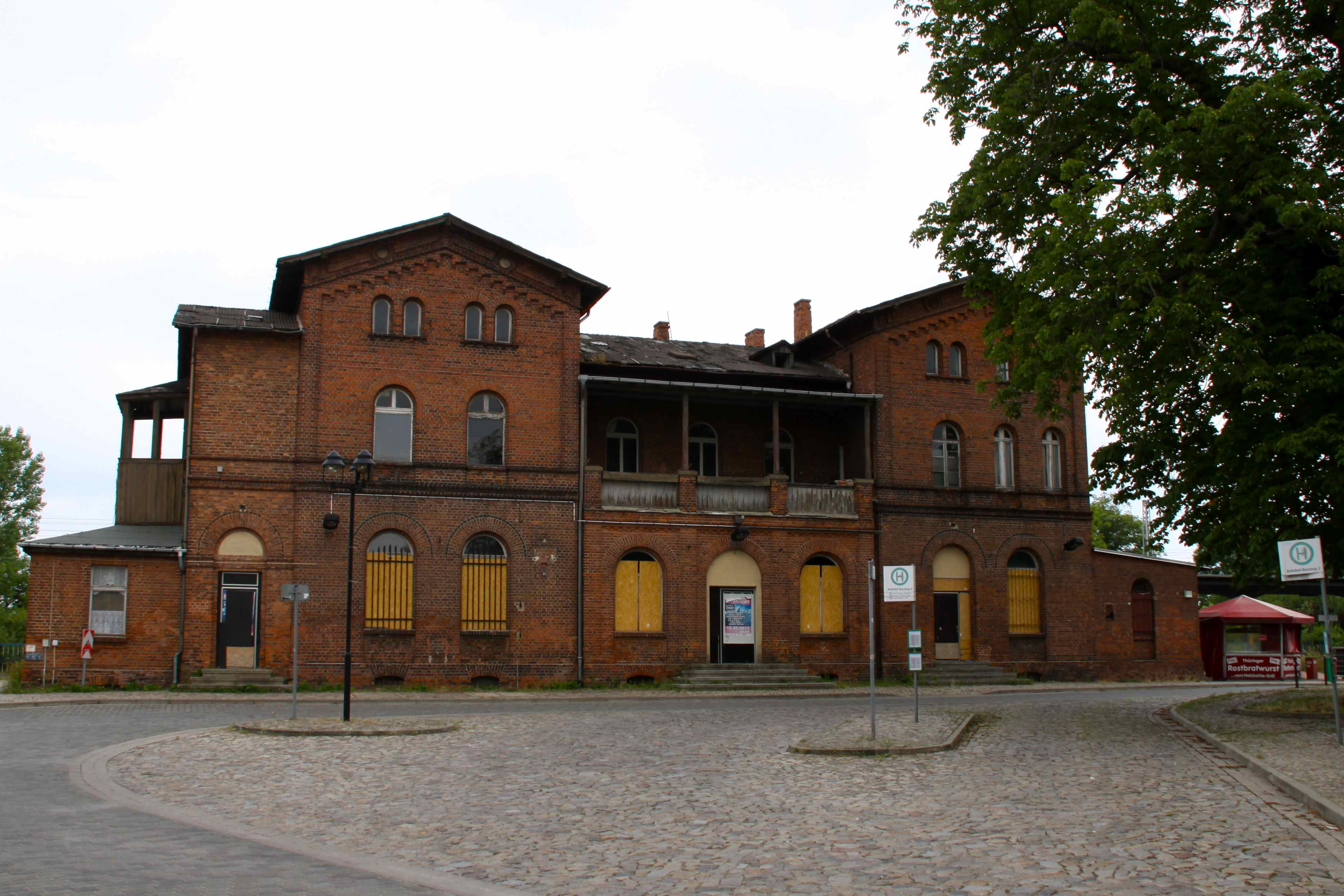 Bahnhof Gommern, Strßenseite